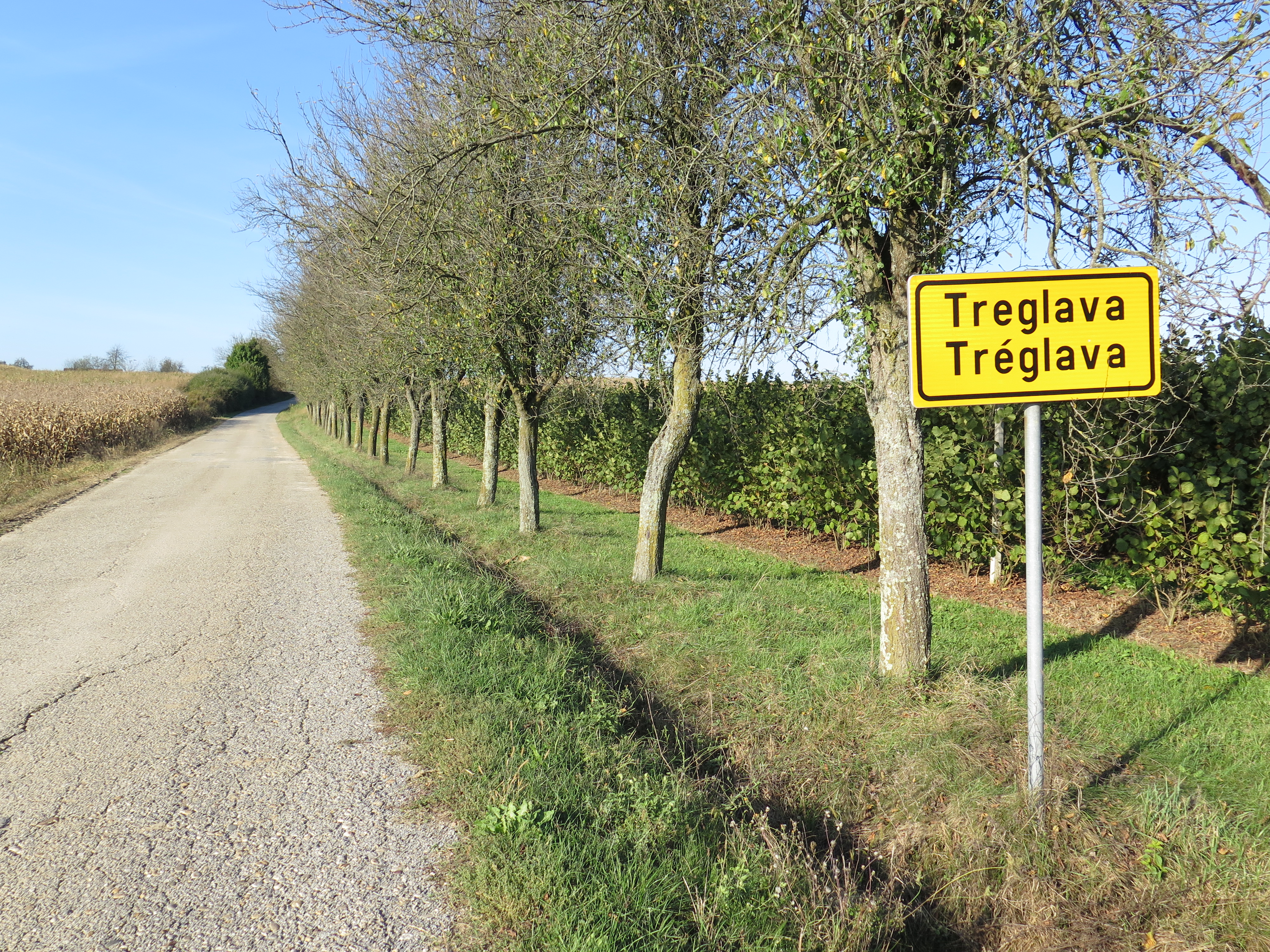 Vjezd do Tréglavy od Ivanova Sela s dvojjazyčnou tabulí.